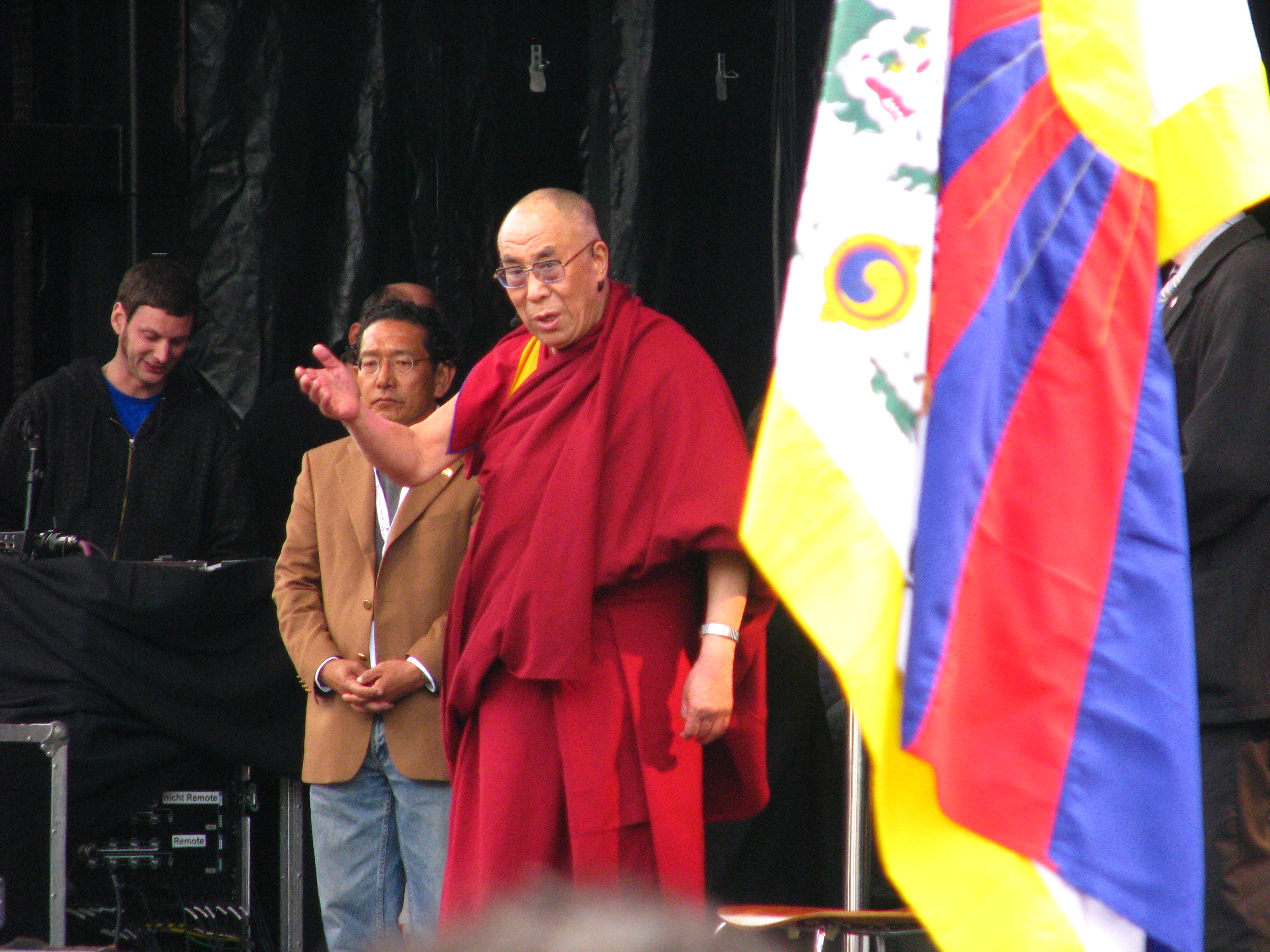 Seine Heiligkeit der 14. Dalai Lama an der Solidaritätskundgebung Die Schweiz für Tibet - Tibet für die Welt vom 10. April 2010, veranstaltet von der Gesellschaft Schweizerisch-Tibetische Freundschaft (GSTF) auf dem Münsterhof in Zürich.